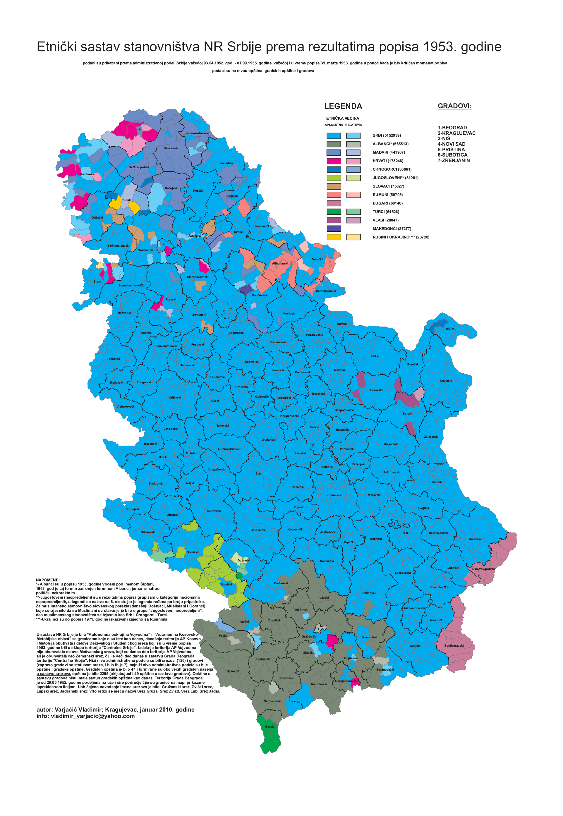 autor: Varjačić Vladimir; izvor Popis stanovništva 1953. godine u NR Srbiji.